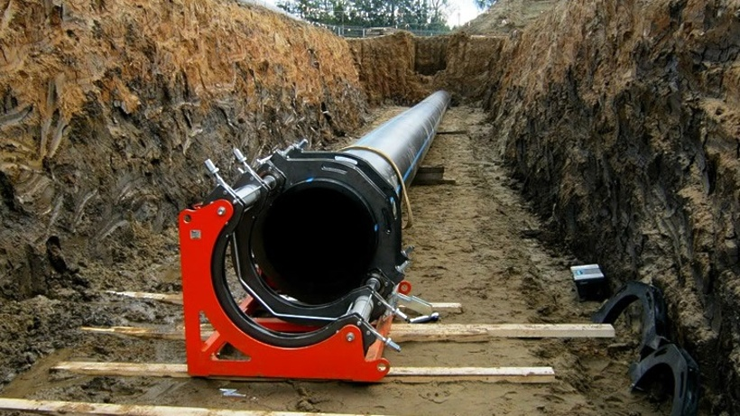 Восточная система водоснабжения труба